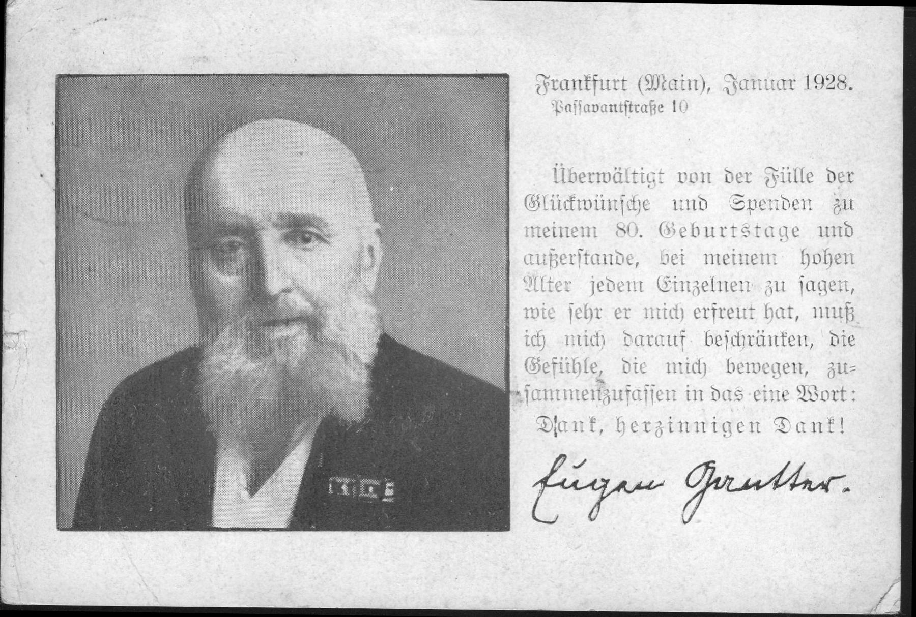 Archiv L! Teutonia Bonn von 1844 Dr. phil. Eugen Gantter, Schriftsteller